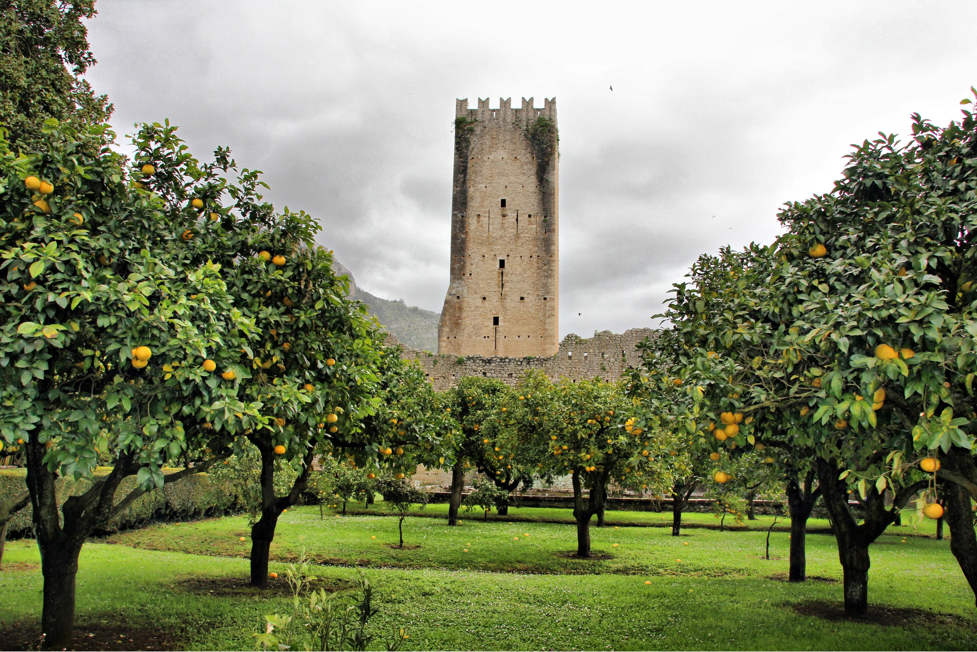 Giardino di Ninfa con i ruderi della città medievale This is a photo of a monument which is part of cultural heritage of Italy.